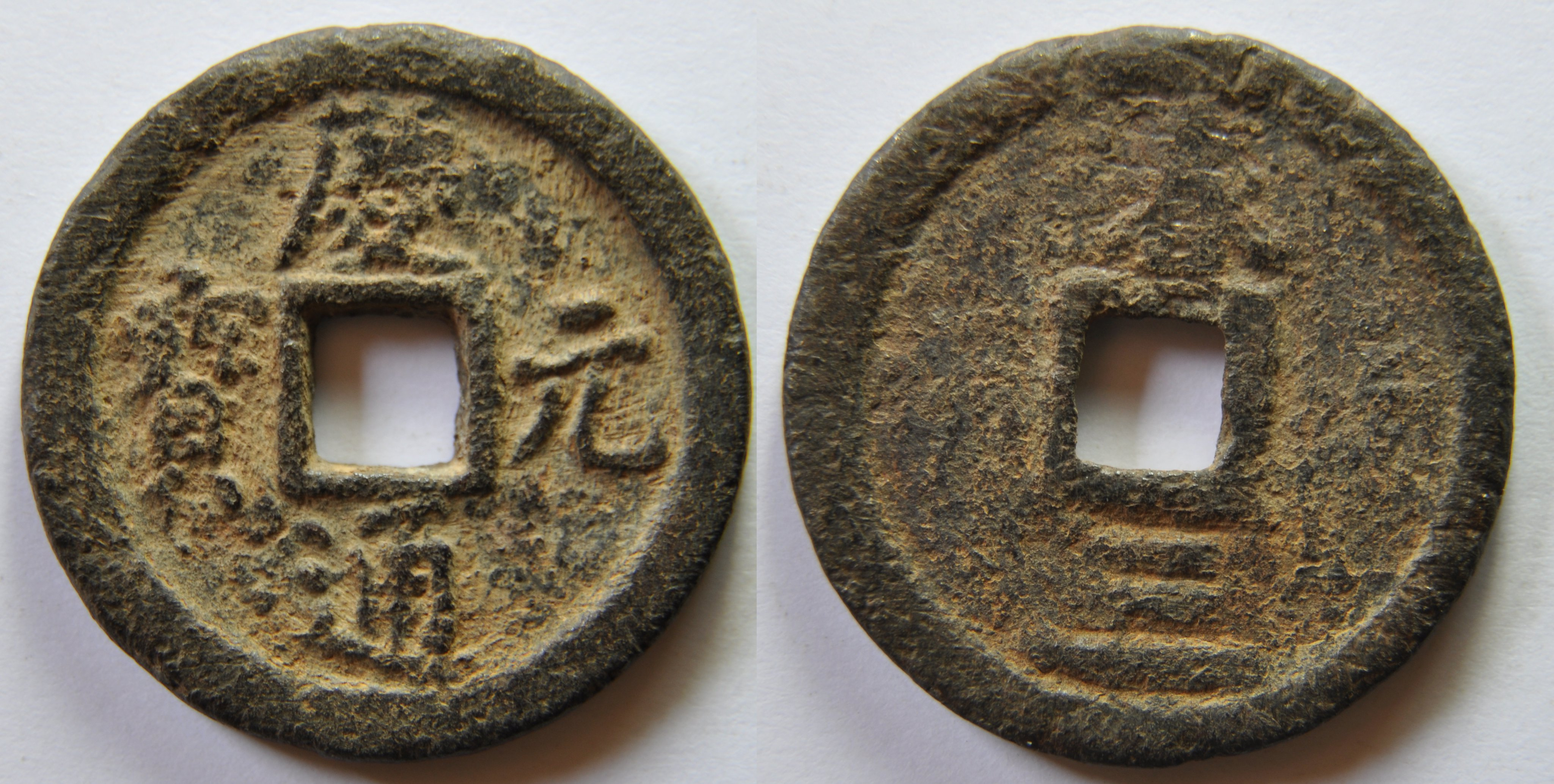 Une monnaie en fer de 2 sapèques (2 cash) de l'empereur Ning Zong (1195-1224), ère Qing Yuan (1195-1200) de la dynastie des Song du Sud (1127-1279), émise à Qichun au Hubei en 1197 en lecture circulaire et écriture régulière. A/ Qing Yuan tong bao (Monnaie courante de Qing Yuan) R/ chun san (Chun pour Qichun et 3 pour 1197) Dimension : 29 mm Poids : 7,2 g. Référence : H17.395 Indice de rareté : 12, commune à très commune d'après D.Hartill Remarque : En 1191, l'atelier de Qichun au Hubei, sur la frontière avec l'empire des Jin, émet 100.000 ligatures. Chine monnaie Song du Sud Monnaies de la dynastie des Song du Sud